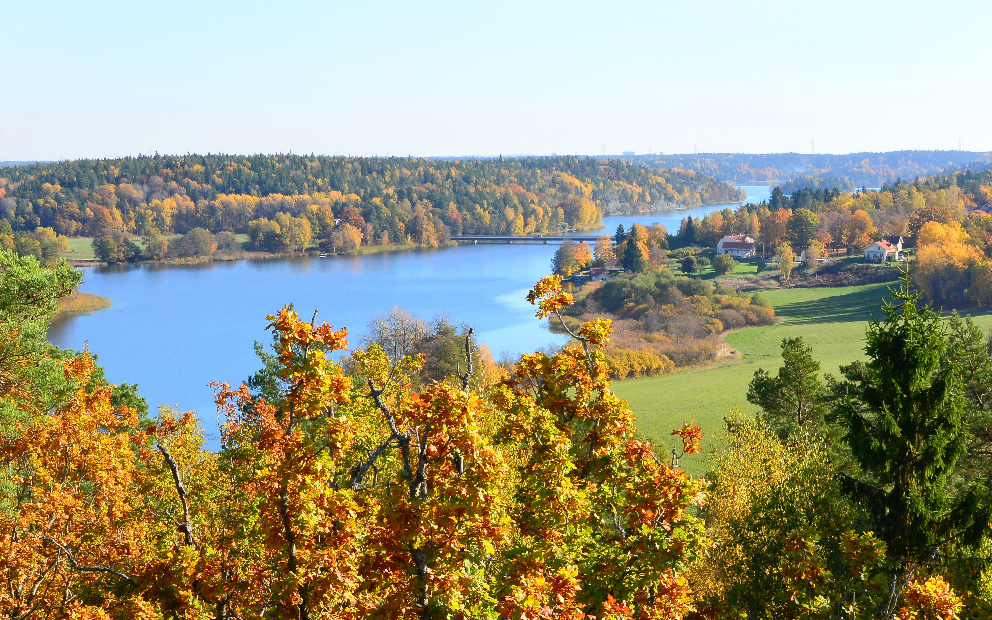 Utsikt över Orlången och Stensättra gård från Stensättra fornborg i Huddinge.